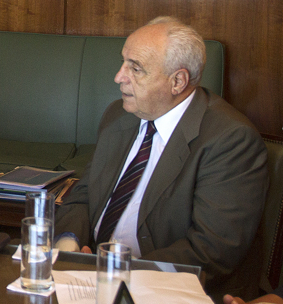 El ministro de Transporte, Guillermo Dietrich, recibió hoy al ministro de Transporte y Obras Públicas de Uruguay, Víctor Rossi, para avanzar en la implementación de un plan estratégico binacional de política portuaria que potencie el transporte de carga de ambos países.